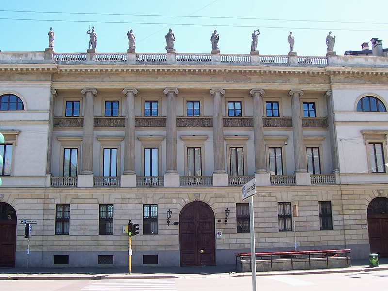 Milano - Palazzo Rocca Saporiti